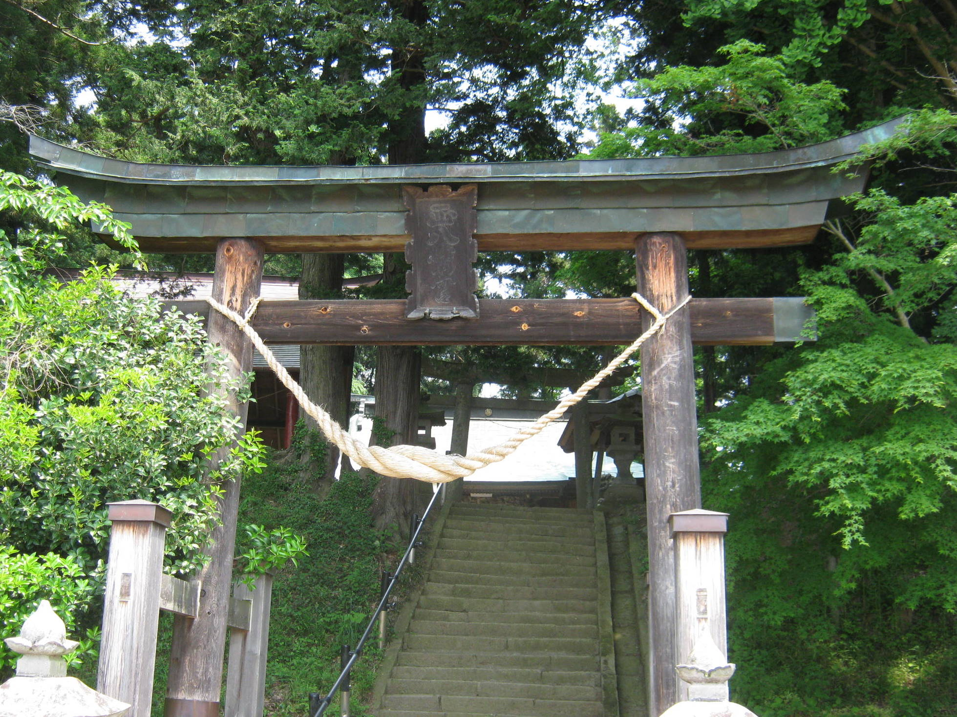 城山八幡神社(守山城本丸跡）